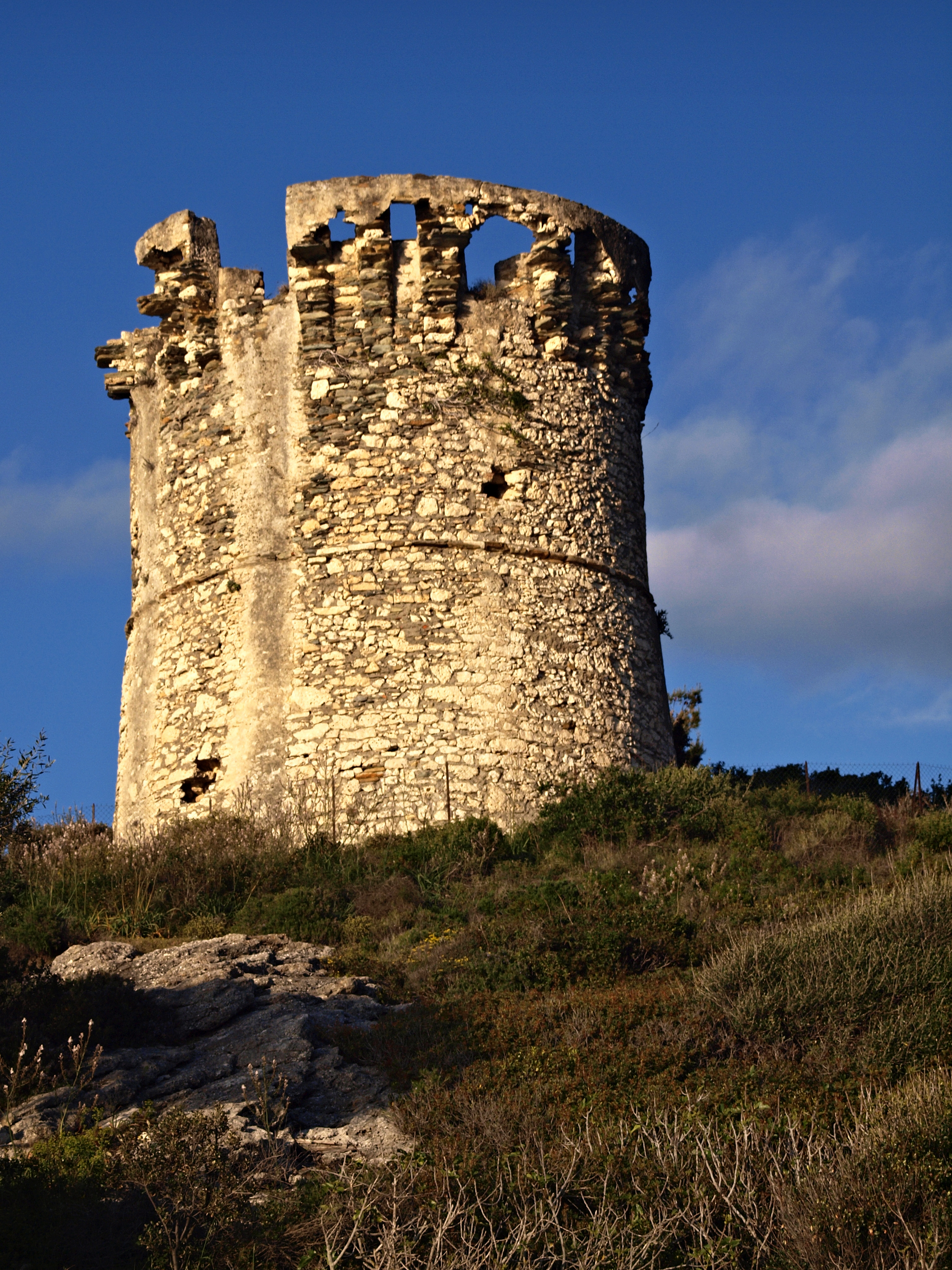 Farinole (Corsica) - Tour génoise à la Marine